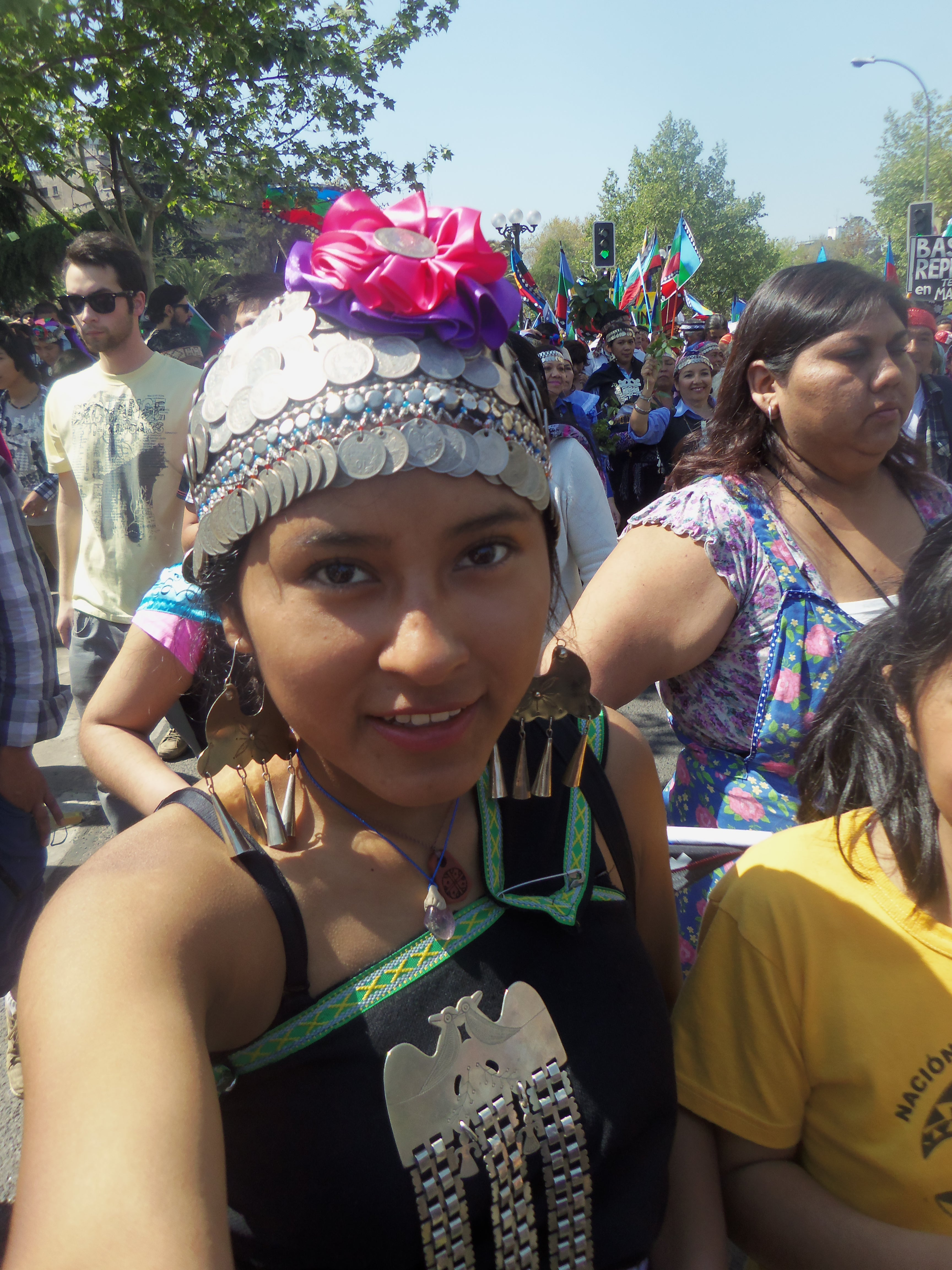 Mujer mapuche con su vestimenta marchando por las calles de Santiago- Chile.